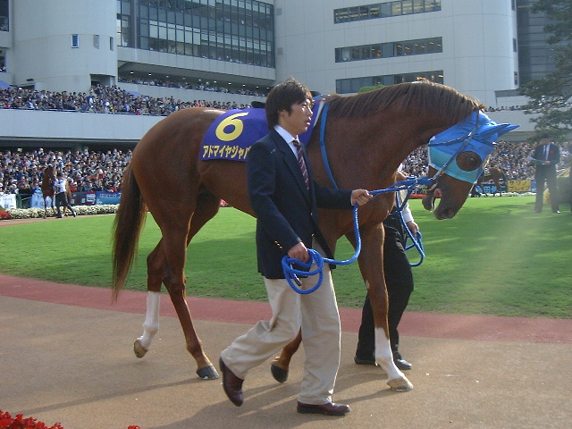 アドマイヤジャパン